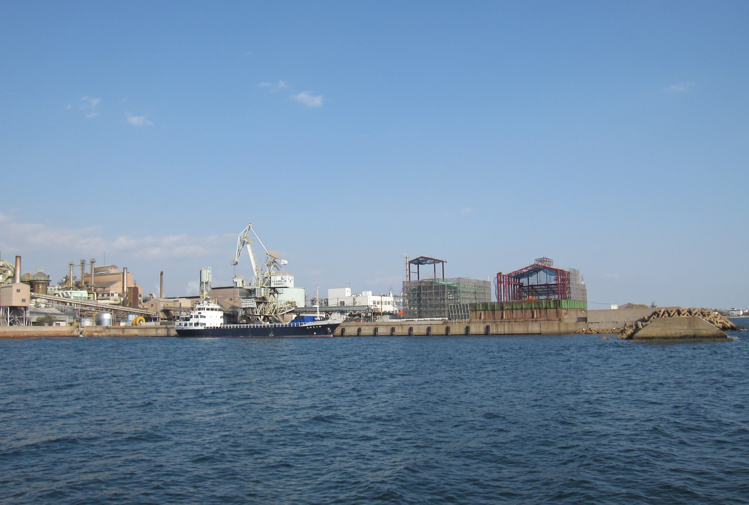 東播磨港（別府地区）